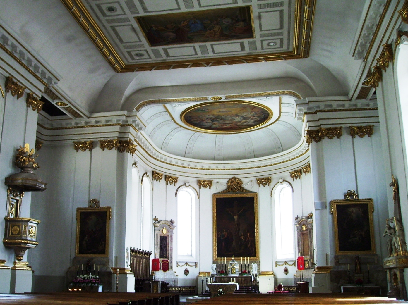 Hechingen, Germany